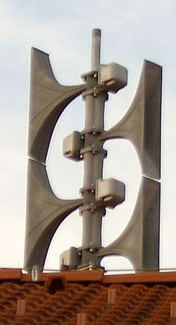 Elektronische Sirene, moniert auf dem Feuerwehrhaus von Weissenbach (Original text: Elektronische Sirene, moniert auf dem Feuerwehrhaus von Weissenbach,) fotografiert am 14.1.04 von Benutzer:Karl Gruber